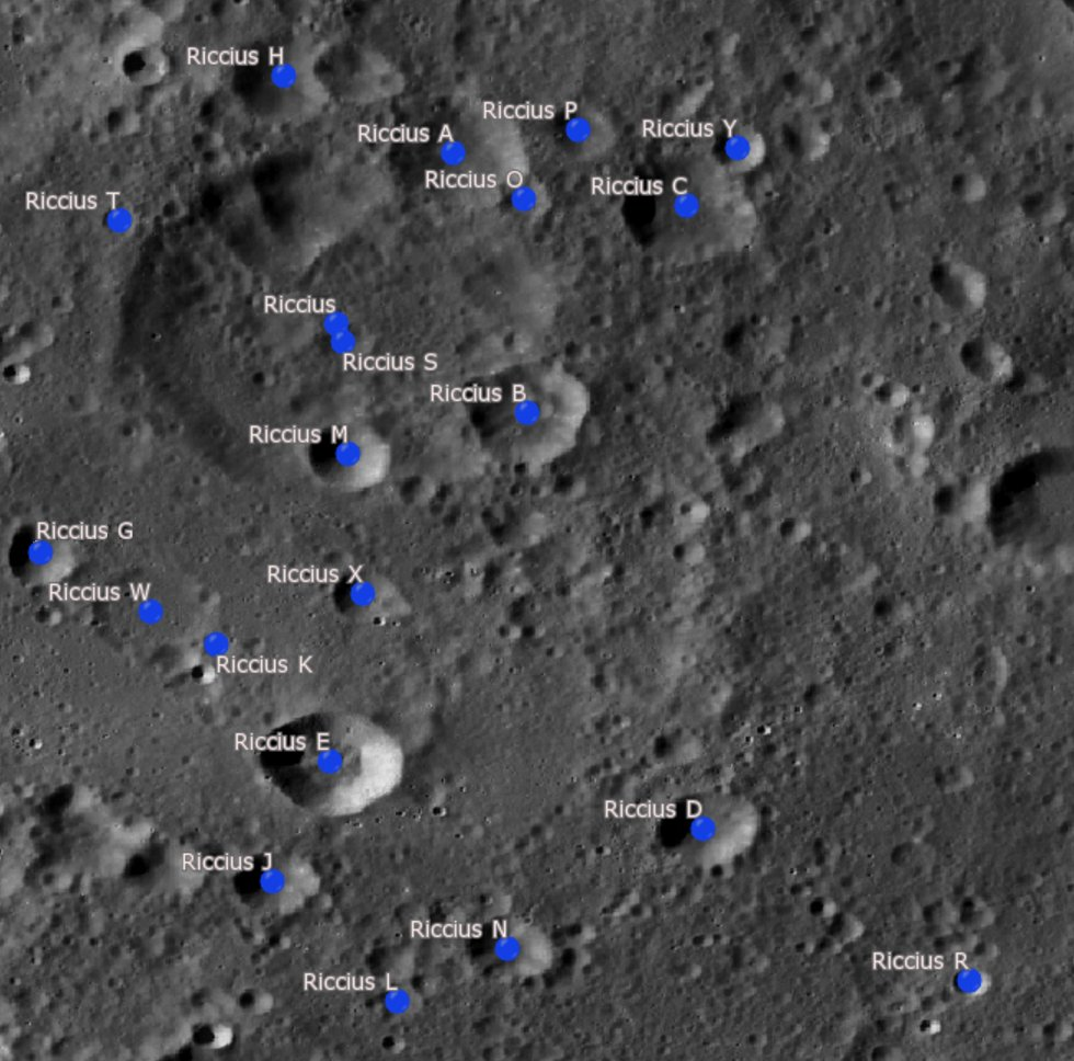 Cráter lunar Riccius. Cráteres satélite. (Imagen LRO)